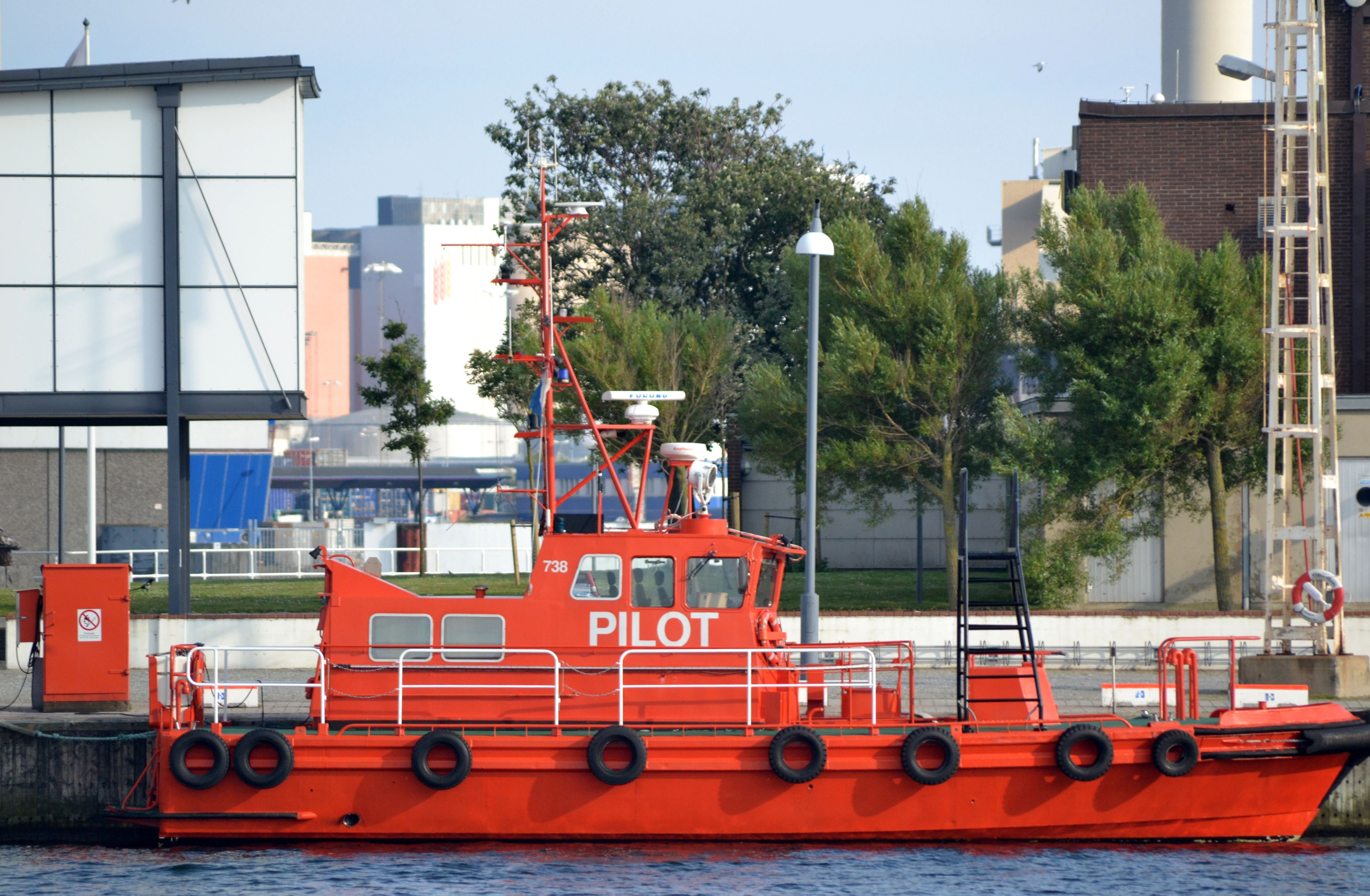 Pilot 738 Ligger till kaj